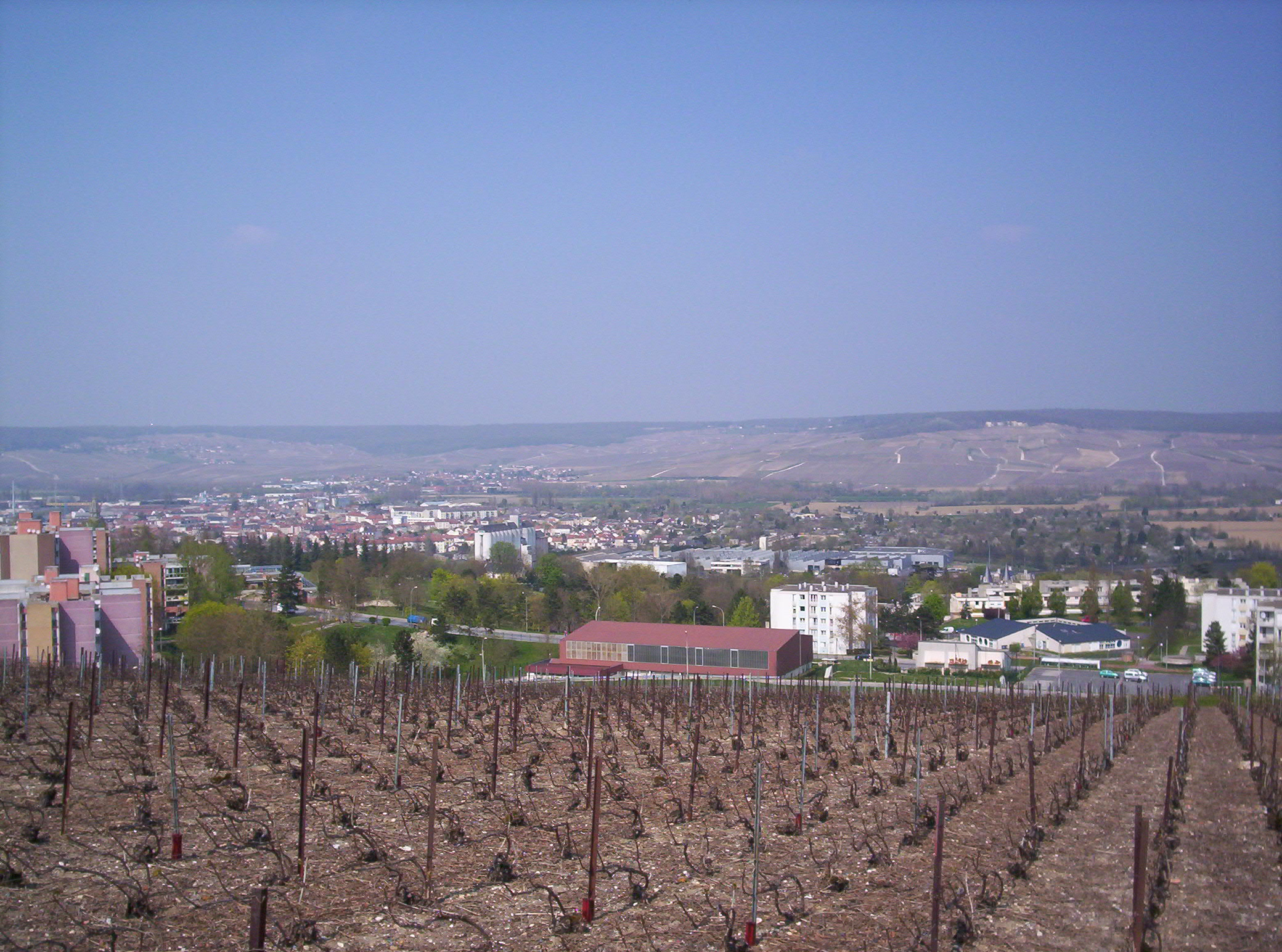 Vue générale d'Épernay depuis le mont homonyme